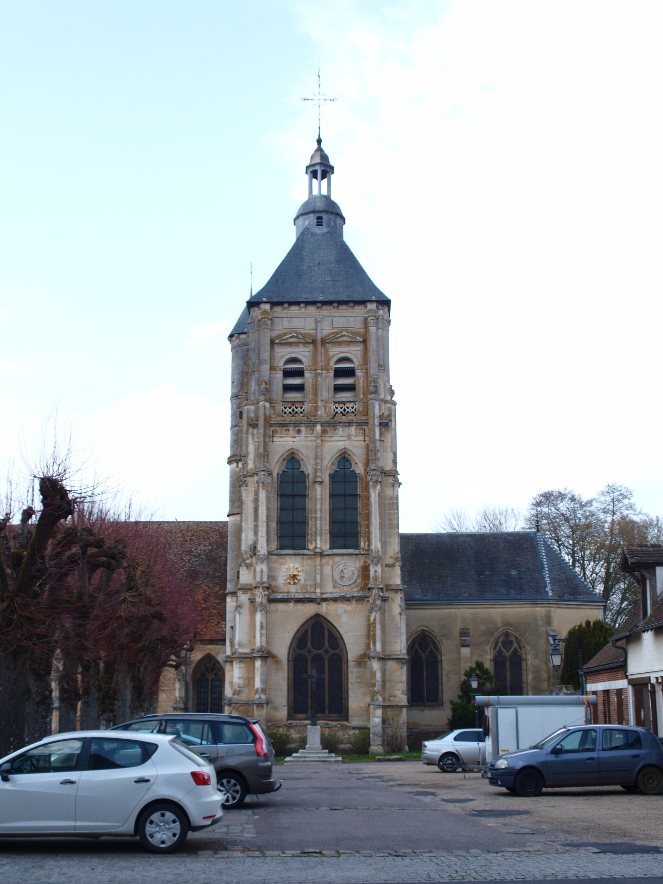 Église Saint-Évroult de Damville (Eure, France)